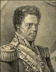 Détail d'un portrait de Jean VI de Portugal publié sur Wikipédia.